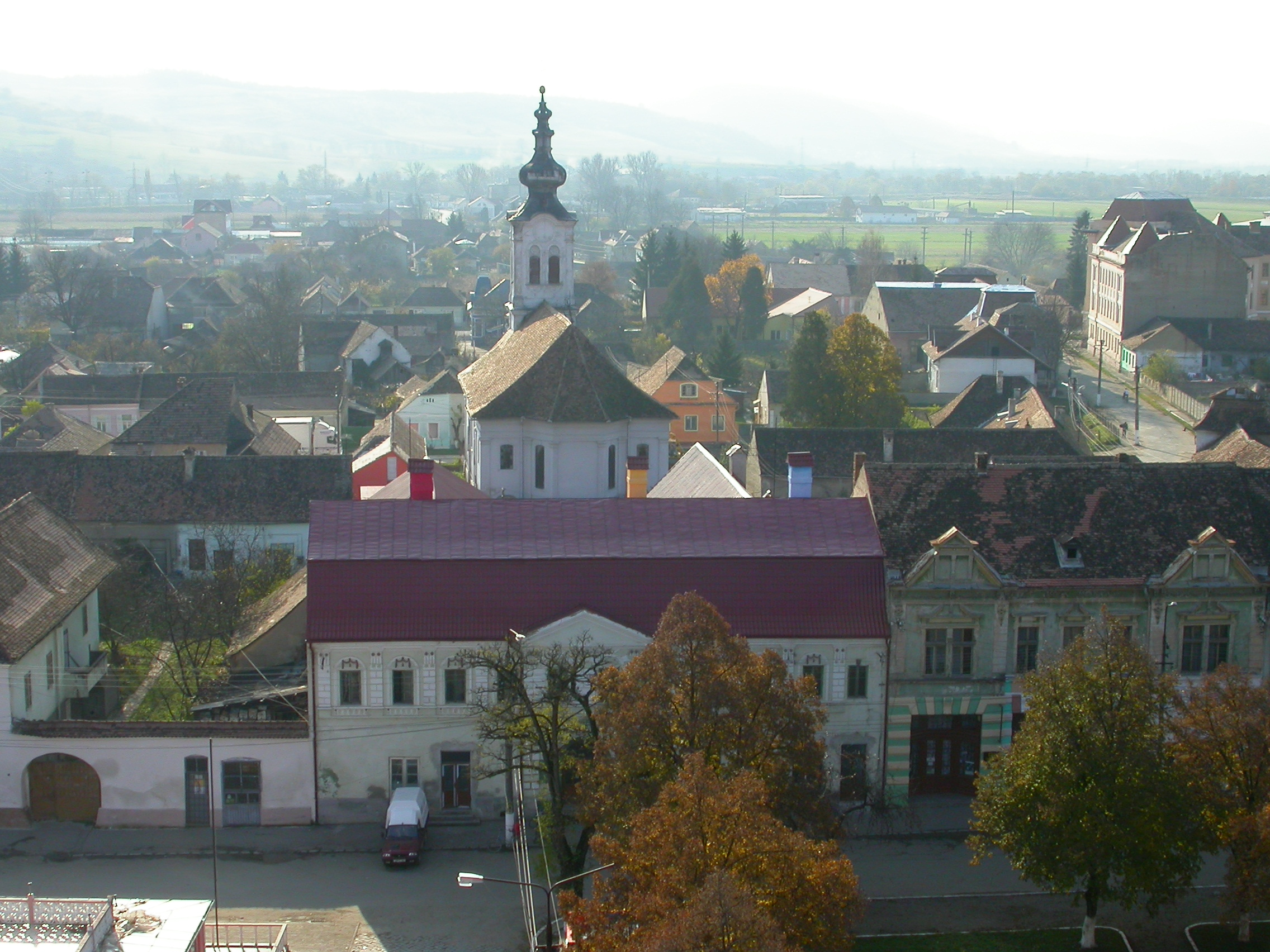 Biserica romano-catolică "Sf. Apostoli Petru și Pavel" (biserica fostei mănăstiri mechitariste), 1795 - 1798